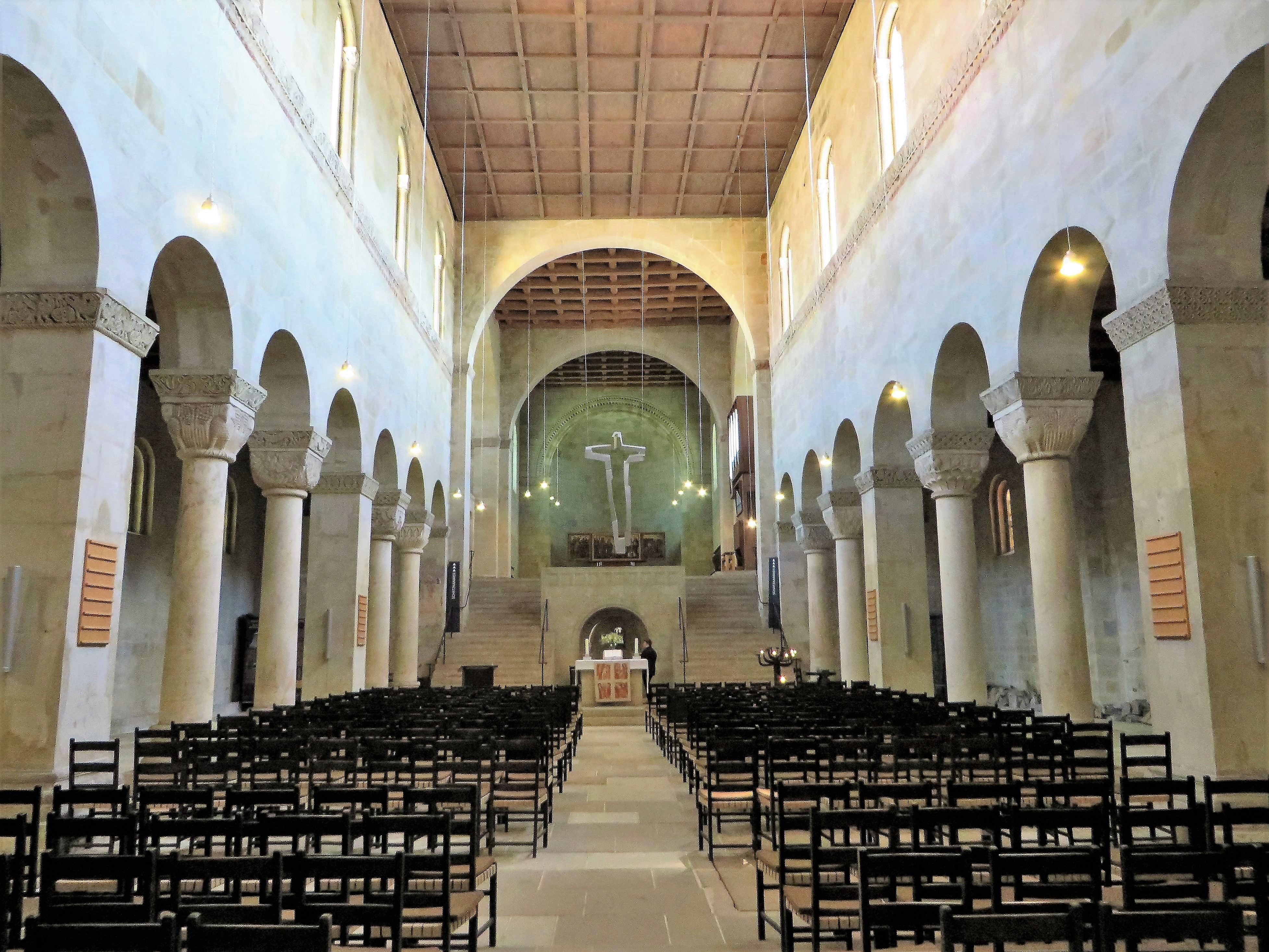 Ehemalige Stiftskirche St. Servatius auf dem Schlossberg zu Quedlinburg. Langhaus mit Blick zum Altar. In der Mitte hängt das große Triumphkreuz aus Aluminium. Rechts und links Säulen und Pfeiler im Stützenwechsel.